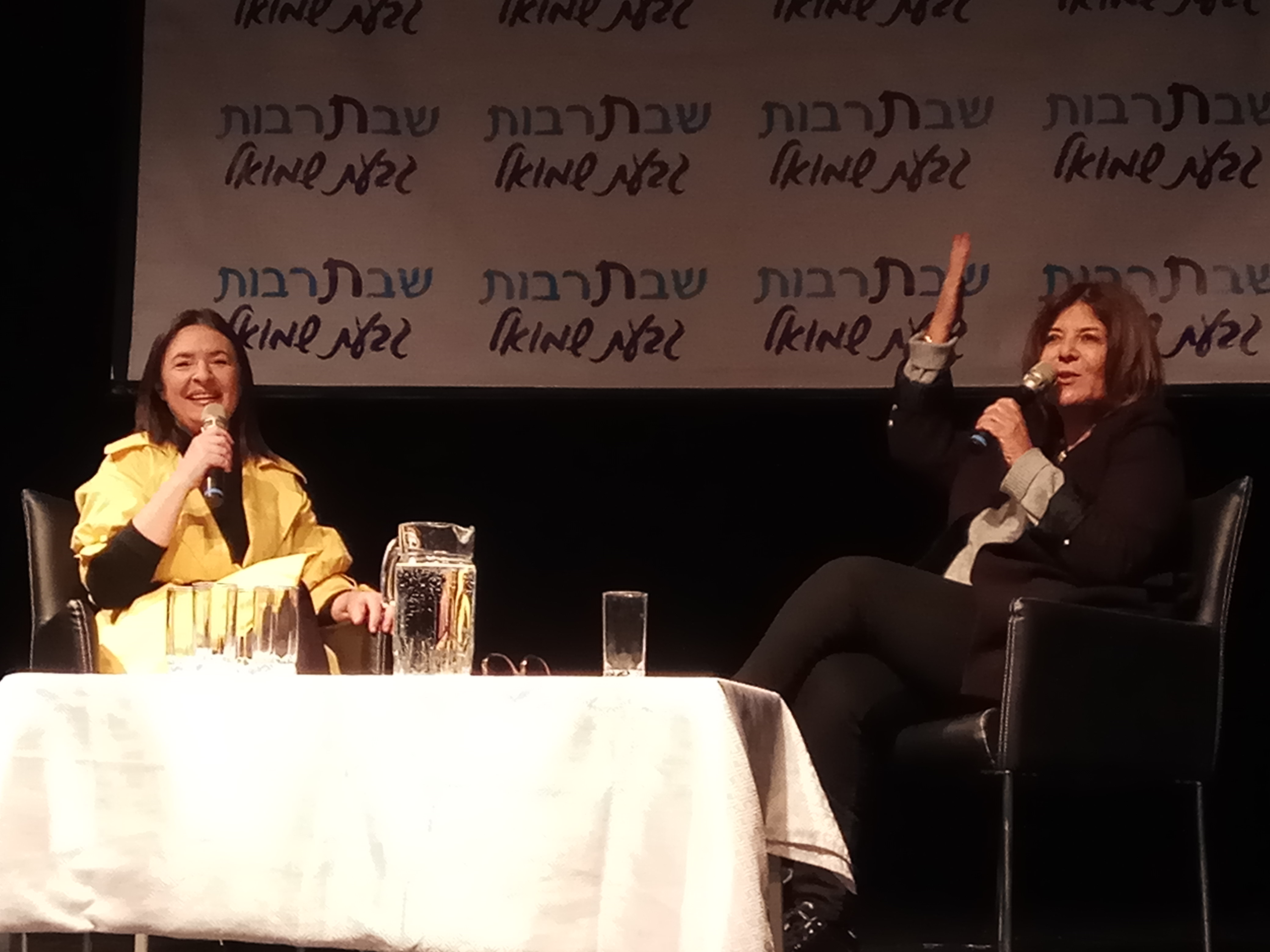 נינו אבסדזה באירוע שבתרבות בגבעת שמואל עם רינה מצליח